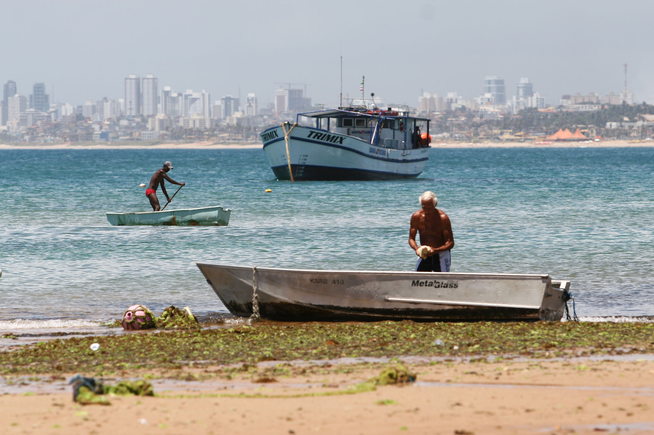 Colônia de Pescadores da Praia de Itapuã Autora: Carol Garcia / AGECOM